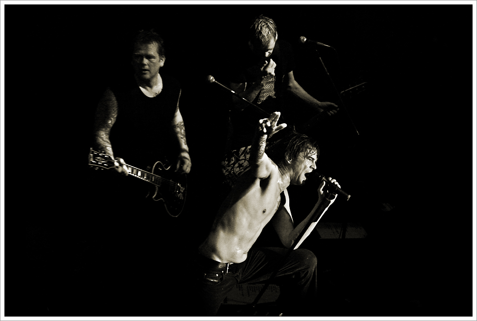 Für Sveno. La mítica (vale repetir) banda punk alemana Die Toten Hosen presentándose en vivo en Buenos Aires. Retoque en honor a Erdosain